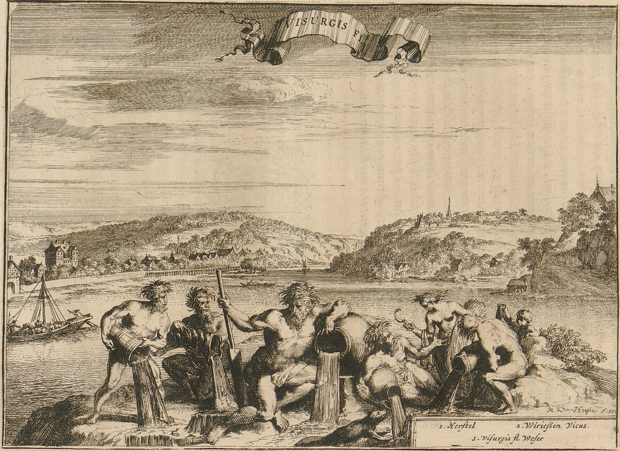 Herstelle, Wuergassen und Weser in der Monumenta Paderbornensia von 1672